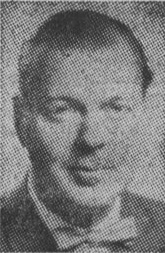 Arkitekten Roland Gandvik